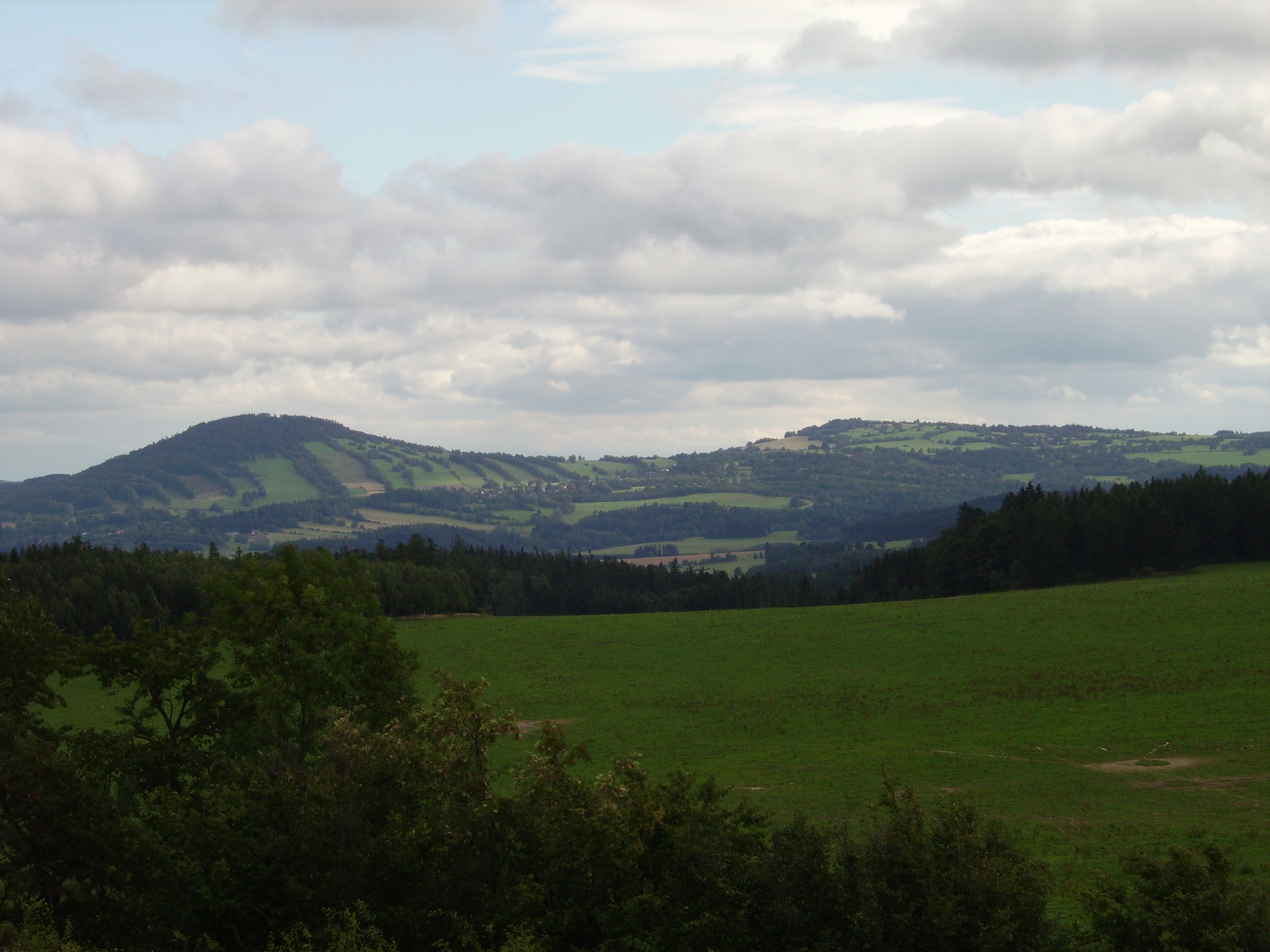 Velký (vlevo) a Malý Roudný; pohled od přístupové cesty k Venušině sopce u Meziny